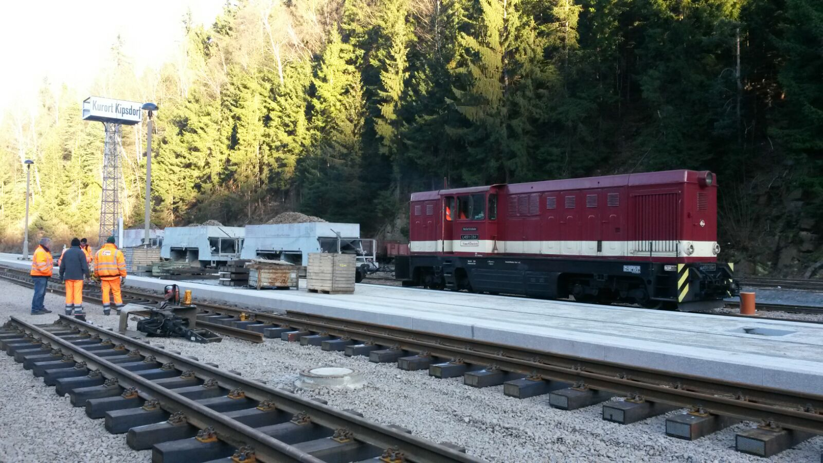 Erste Zug